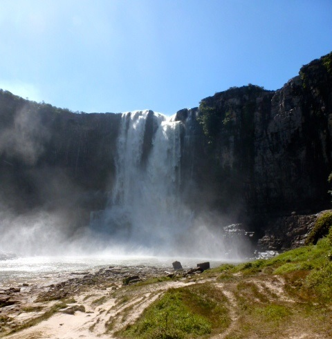 Salto Aponwao, Parque Nacional Canaima, Venezuela